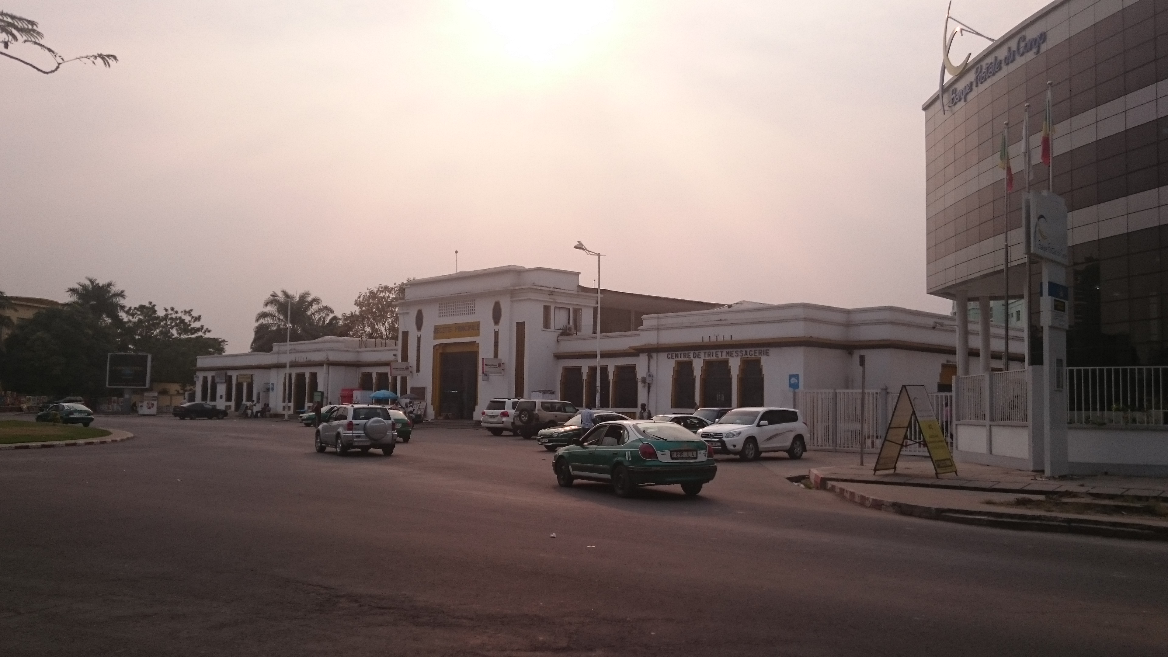 La Poste de Brazzaville en fin de journée This is an image with the theme "Africa on the Move or Transport" from: Congo